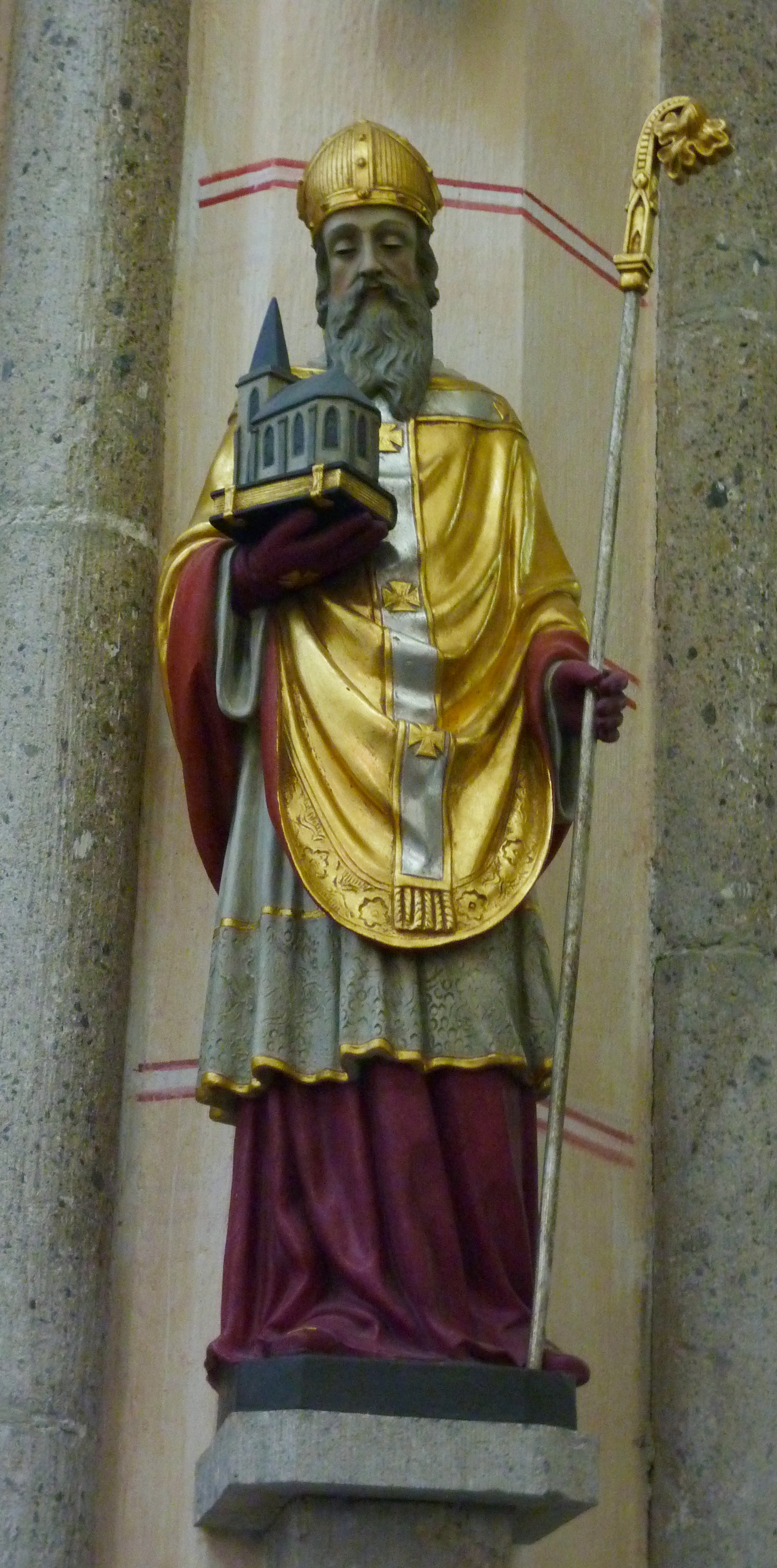 katholische Pfarrkirche St. Maximin und Anna in Ettringen, Statue des hl. Maximin von Trier